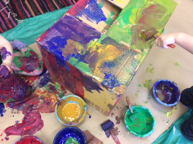 Loovustoa loovustunnis